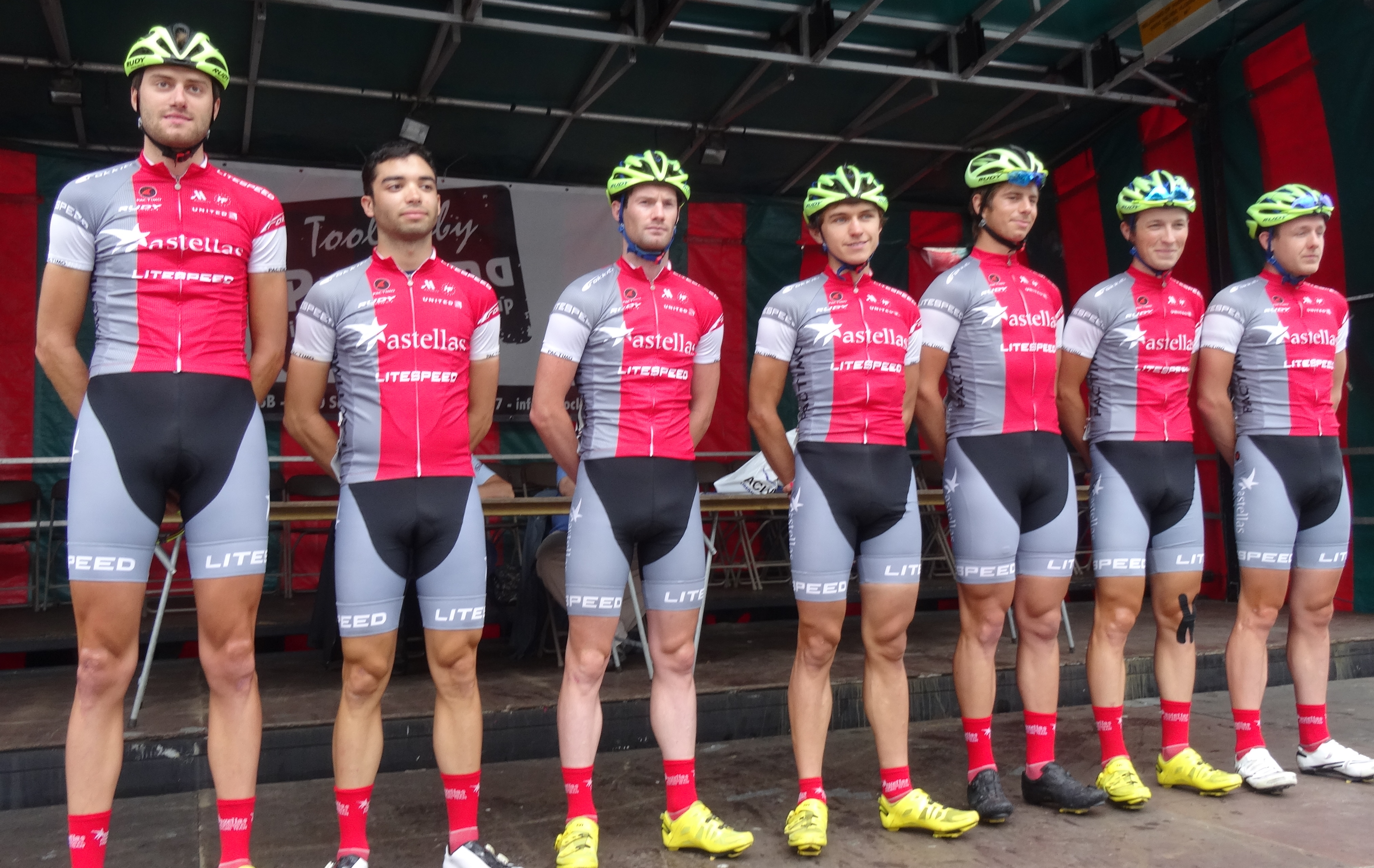 Reportage photographique réalisé le dimanche 10 août à l'occasion du départ et de l'arrivée de la Flèche du port d'Anvers 2014 à Merksem (Anvers), Belgique.